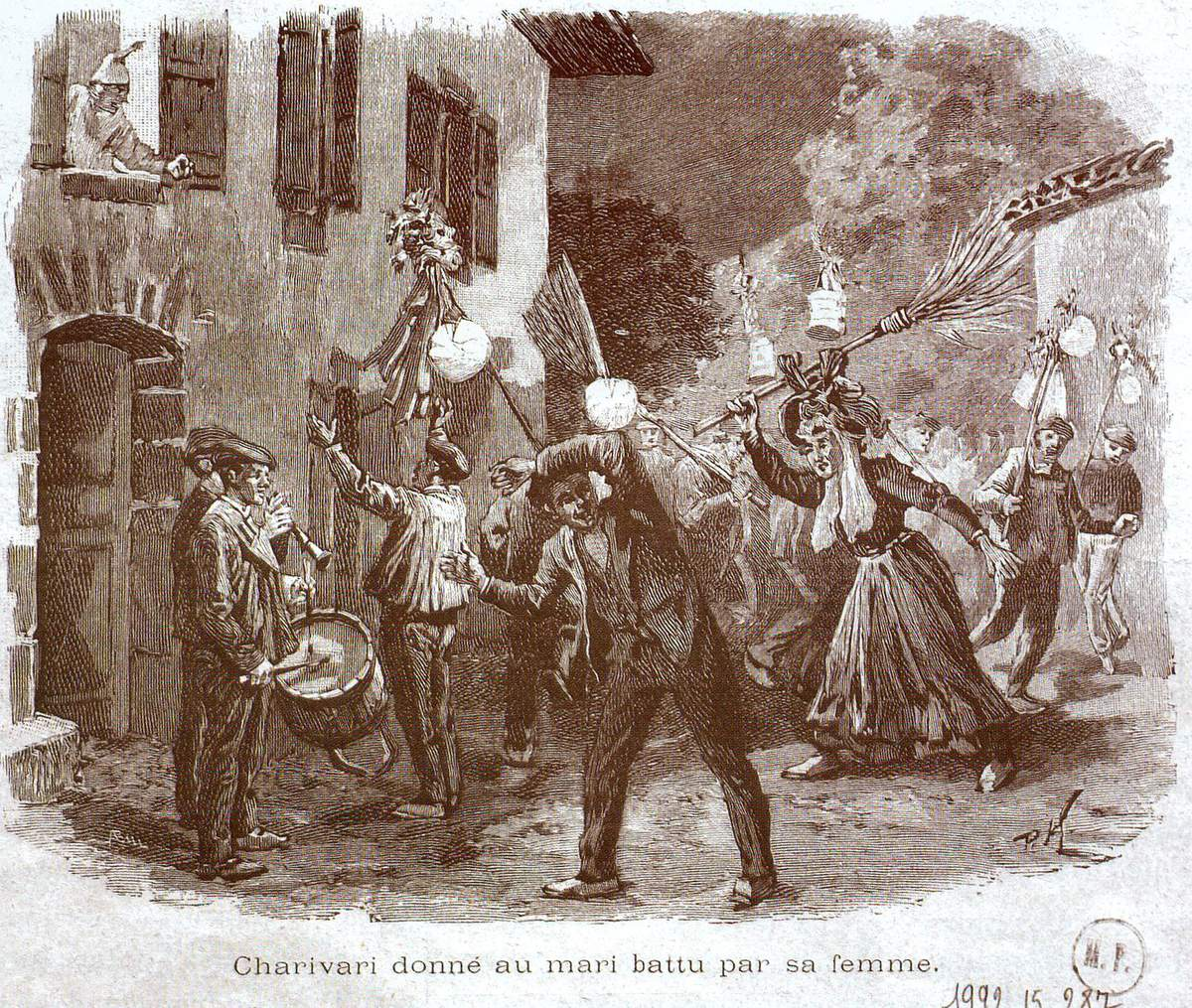 Xaribari baten ilustrazioa, L'Illustration aldizkariatik, 2676 z. 1894eko ekainaren 9an.